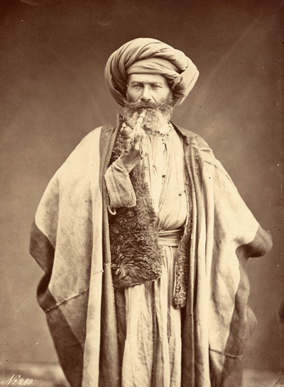 Arab man smoking pipe, late 1800s.